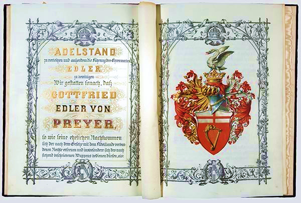 Adelsbrief des Gottfried Preyer, "kaiserlicher Rathe und Vice-Hofkapellmeister des Ruhestandes, Domkapellmeister an der Metropolitankirche zu St. Stephan in Wien", erhoben in den in den erblichen Adelsstand von Kaiser Franz Joseph I. als "Edler von Preyer". Pergamenturkunde mit vier kalligrafischen Textseiten und farbigem, handgemaltem Adelswappen.